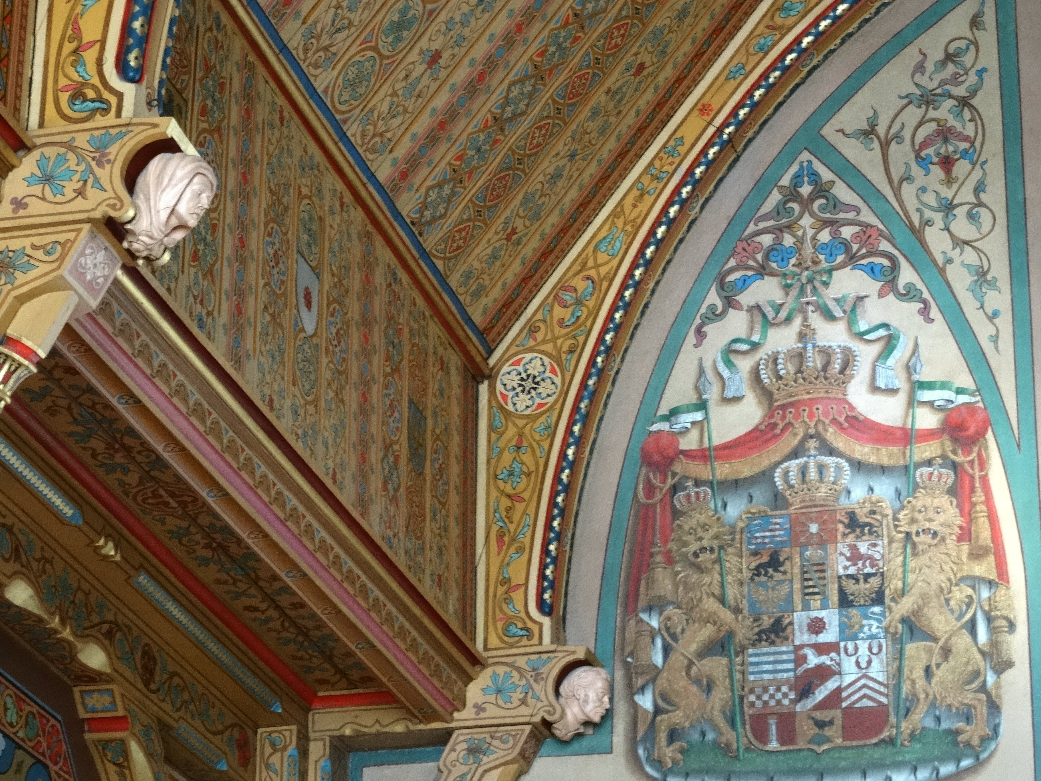 Aula des Geschwister-Scholl-Gymnasiums Sondershausen, Wappenbilder